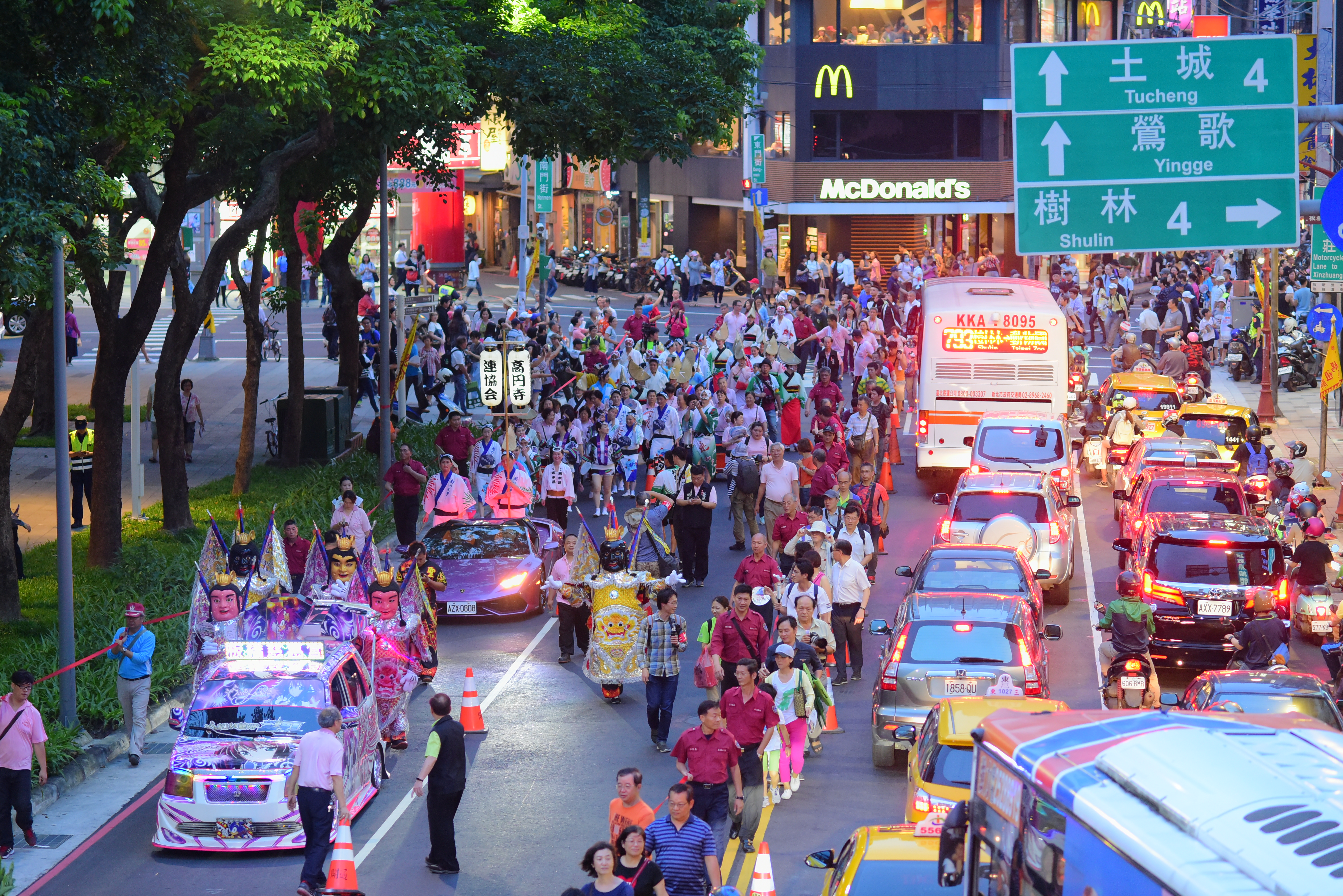 2019東京高円寺阿波踊り 台湾公演 板橋市慈恵宮 (le 26 avril 2019)